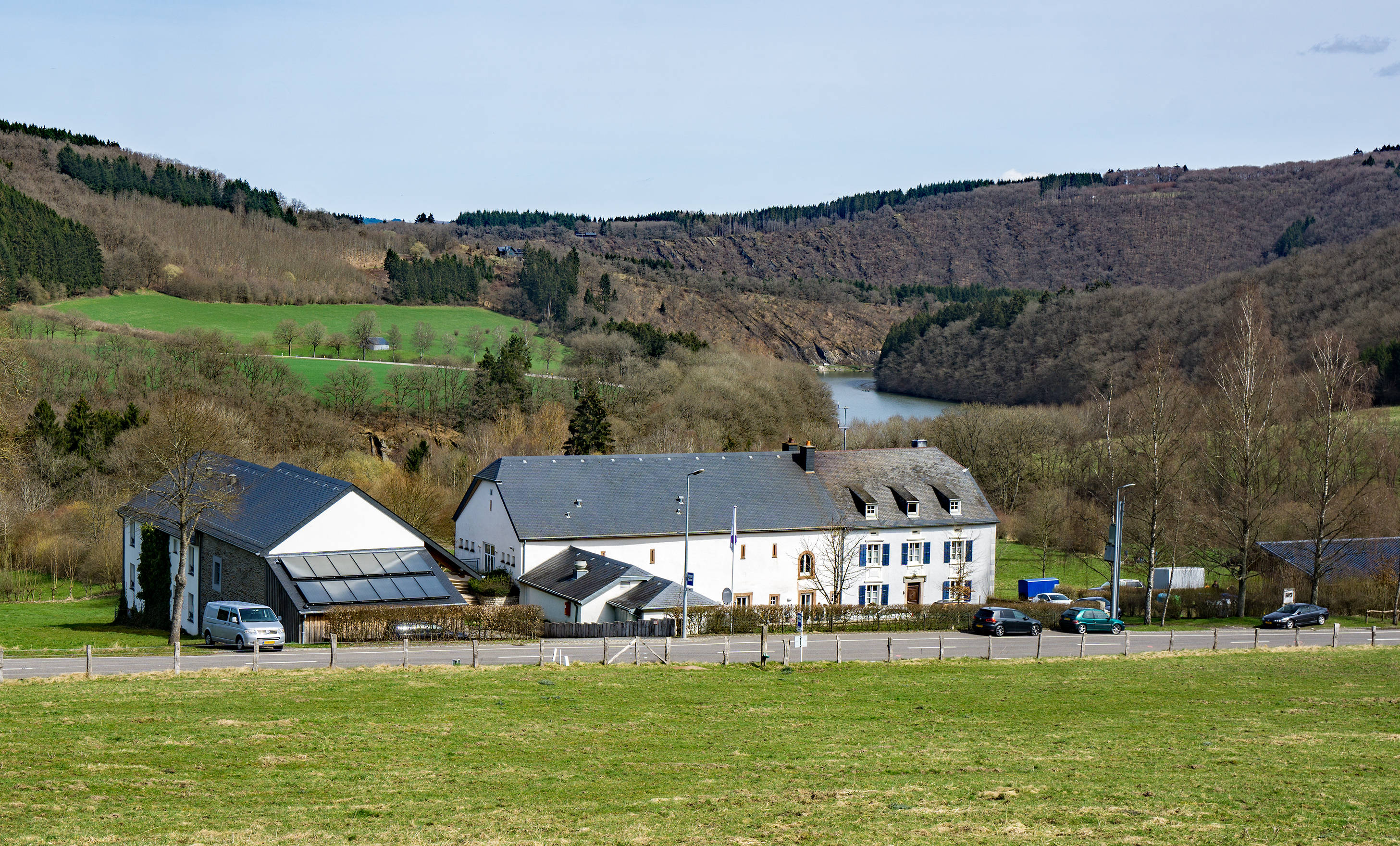 De Misärshaff